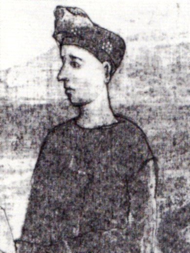 Wilhelm der Ältere, Herzog von Braunschweig-Lüneburg (gest. 1369)